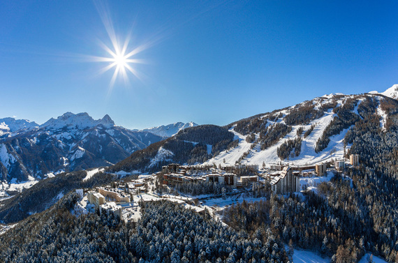 Vue sur Pra-Loup